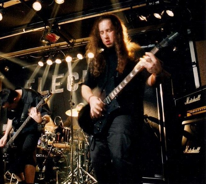 Jose A. Poveda, guitarra.